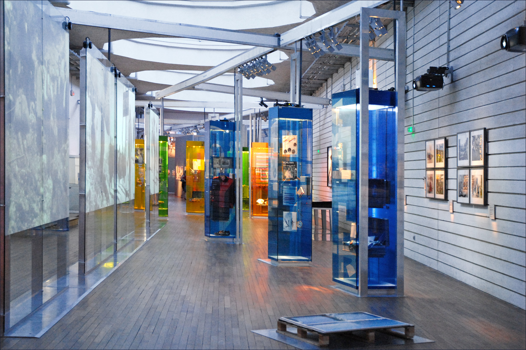 L’exposition permanente « Repères » de la Cité nationale de l'histoire de l'immigration retrace deux siècles d’immigration en France, en montrant la part importante prise par les immigrés dans le développement économique, social et culturel de la France.